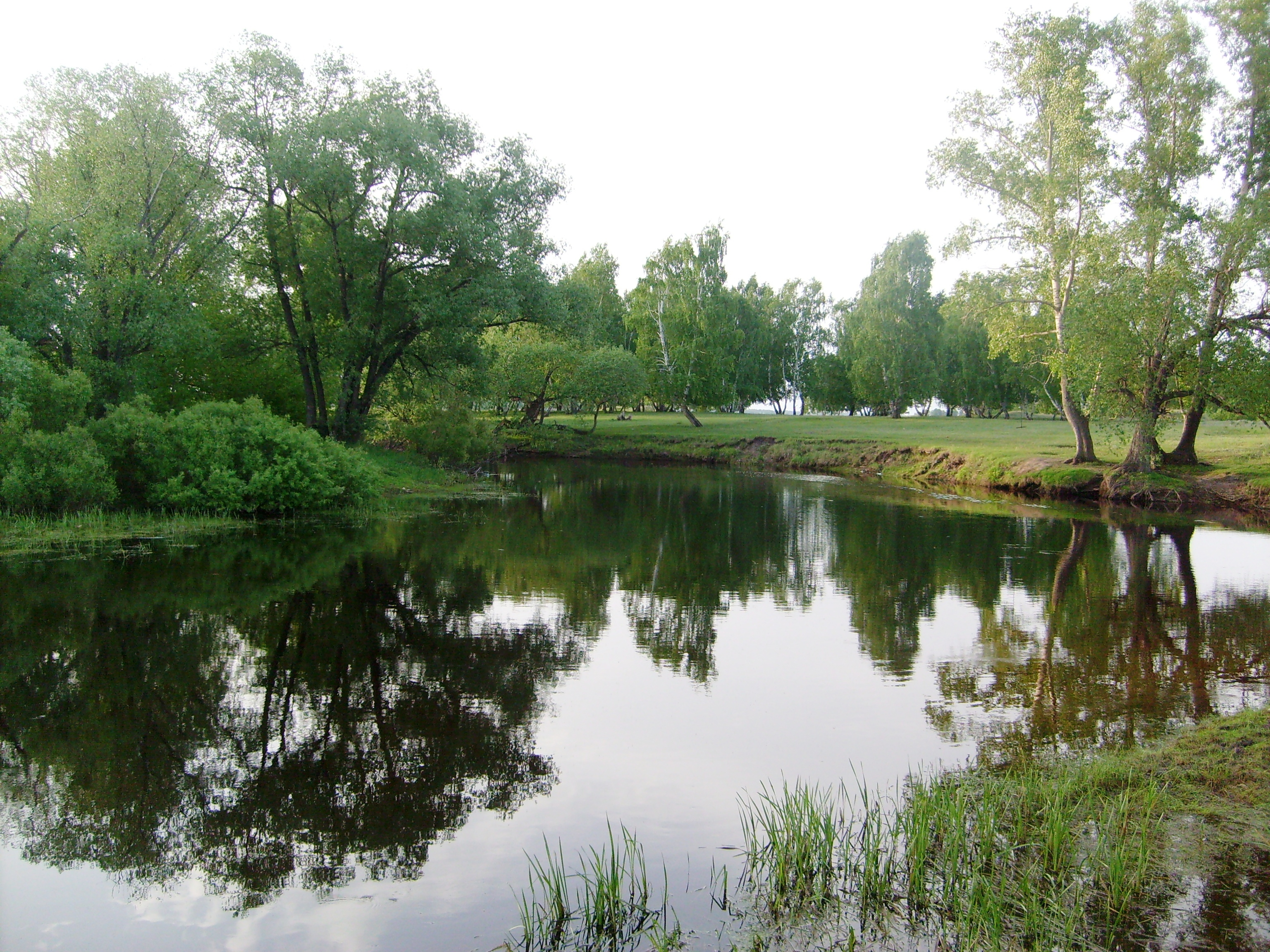 р.Бурла